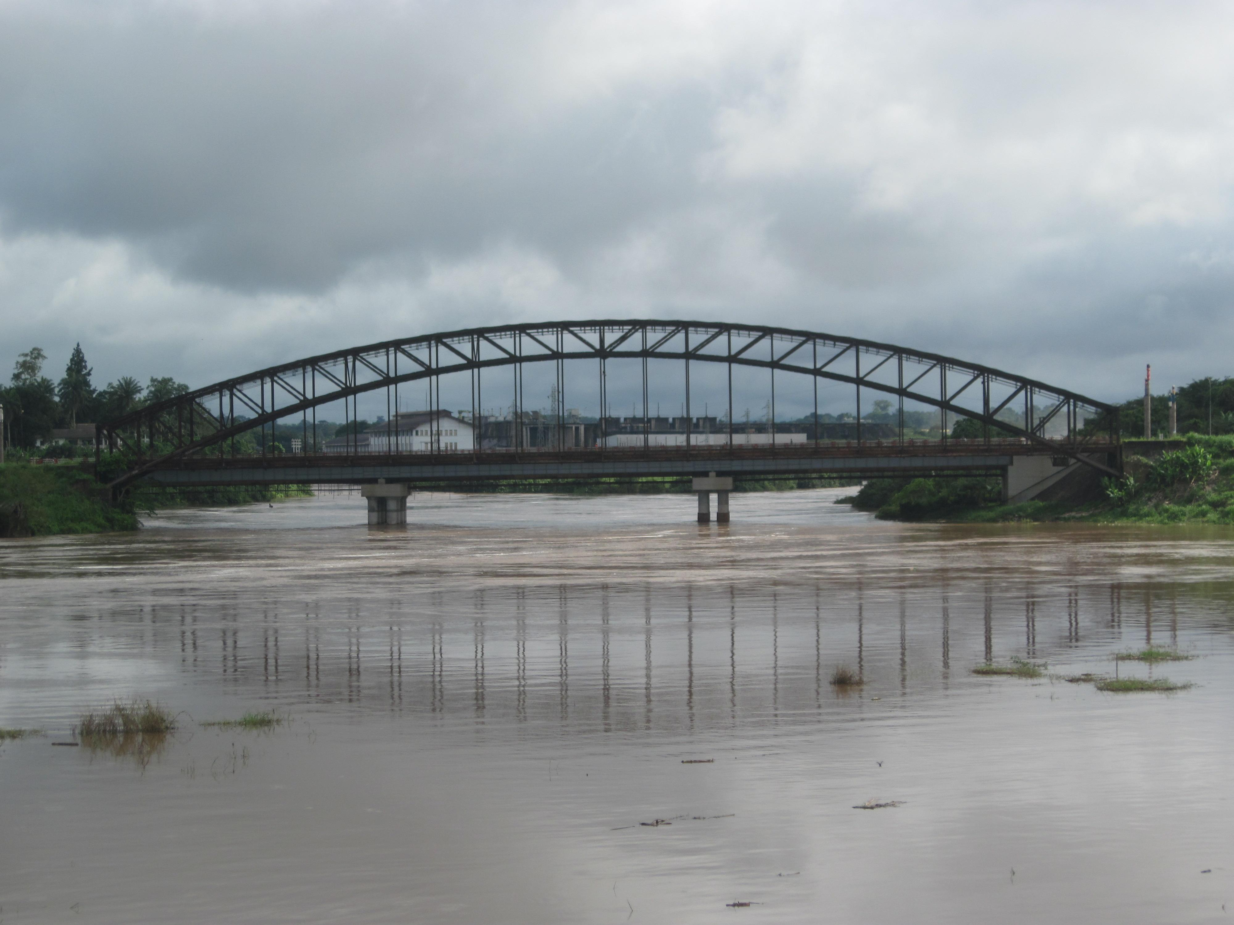 Prise au marché de bord